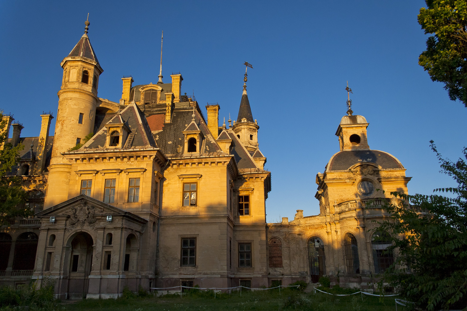 Schossberger-kastély (Tura, Kossuth u.)